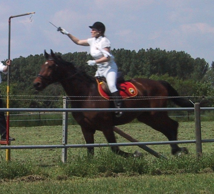 Ringreiter